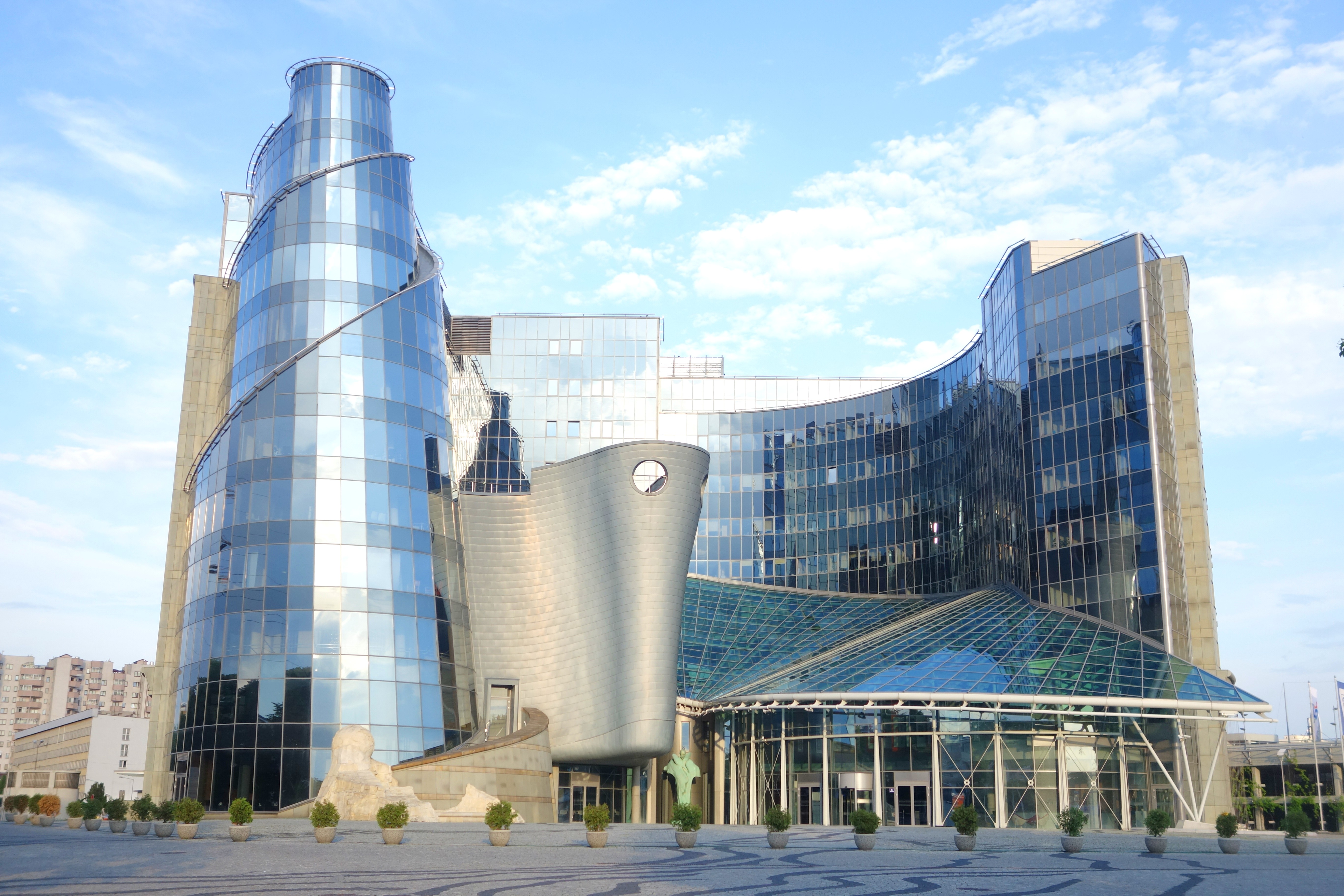 Warszawa, TVP budynek B (front)